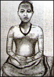 ആചാര്യ കുക്കണിയാൾ